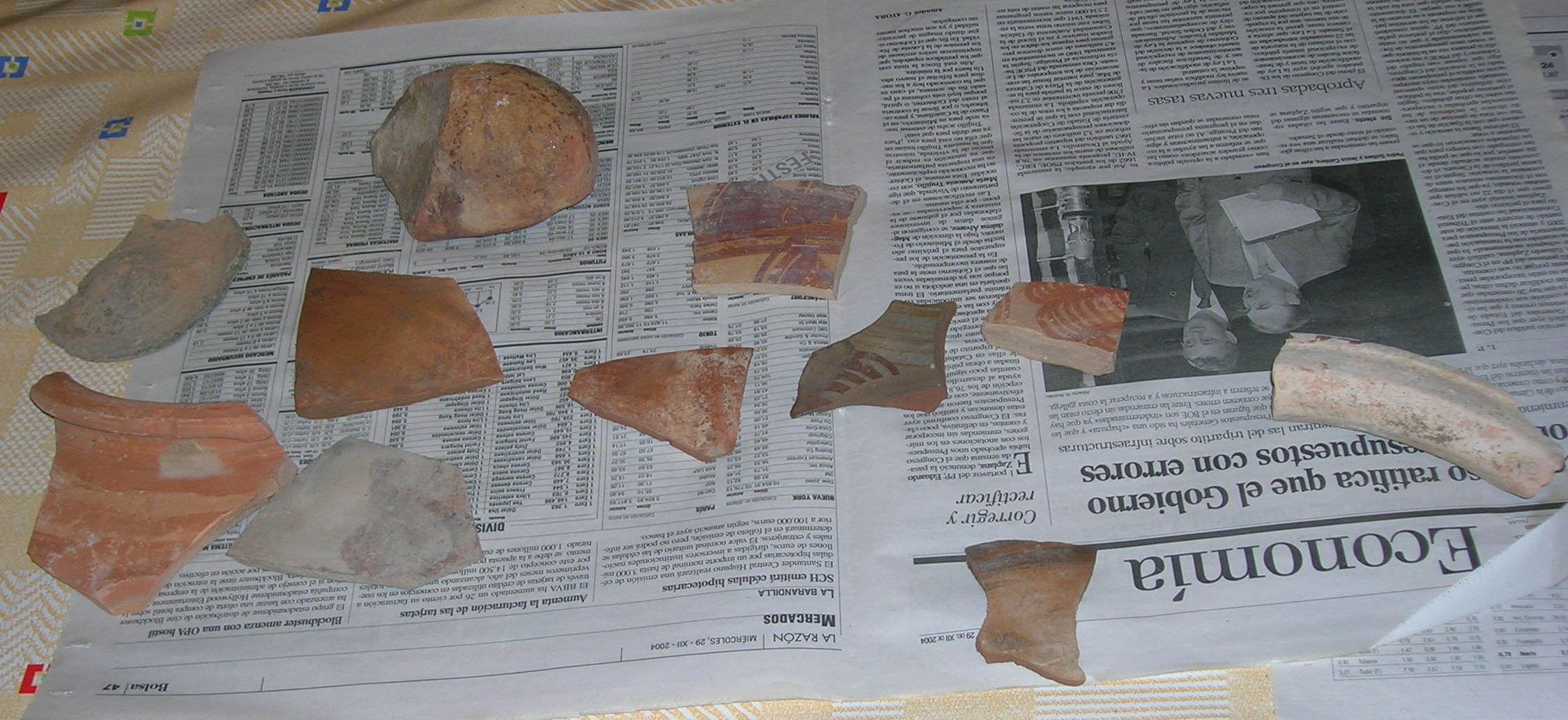 Restos de típica cerámica ibérica, en el paraje de los Castellones (t.m. Villarrobledo).